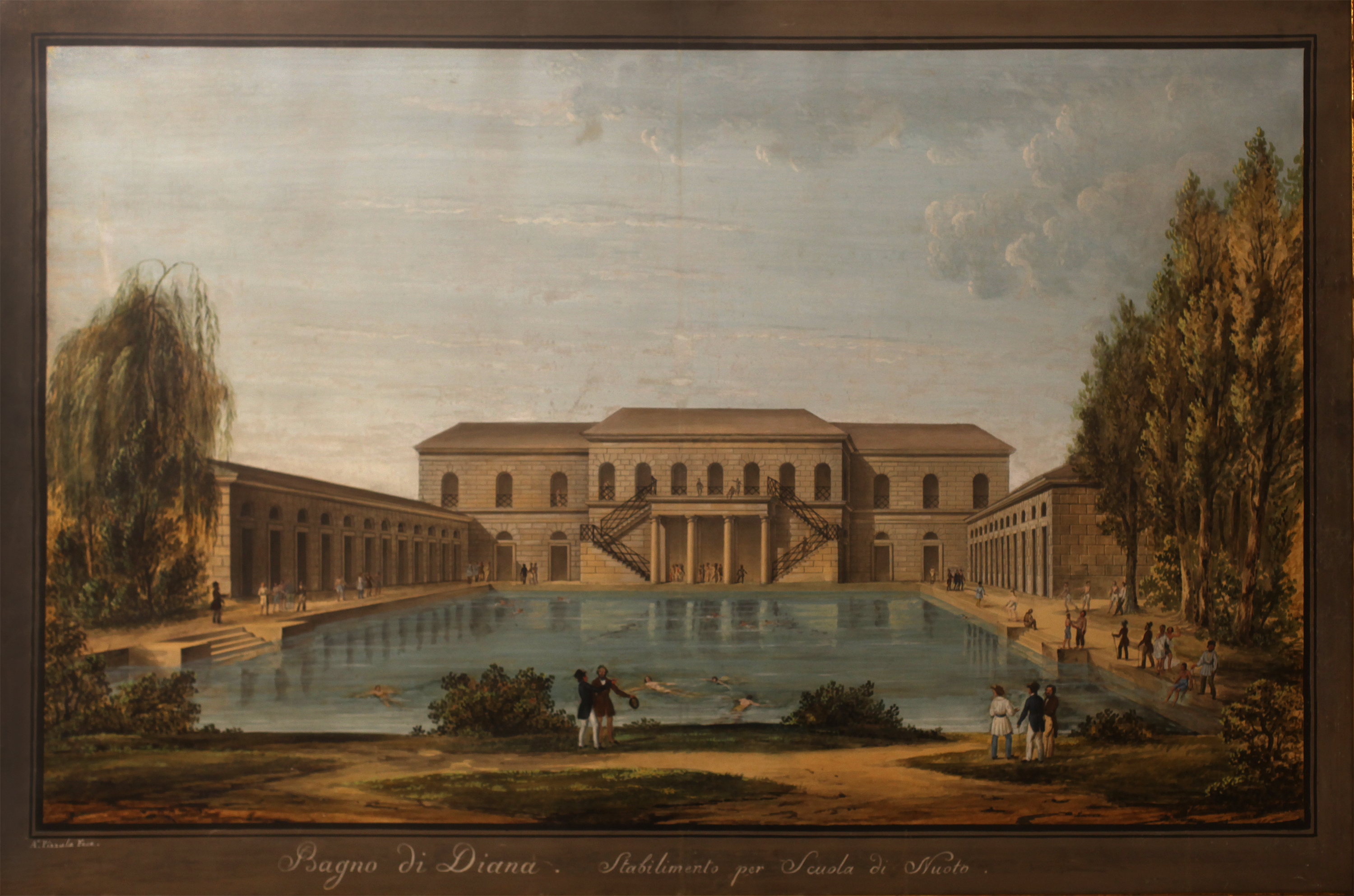 Andrea Pizzala (1798-1862) Il Bagno di Diana - stabilimento per scuola di nuoto (1842), Palazzo Morando, Milano; collezione Luigi Beretta, 1934. Tempera a acquarello su carta